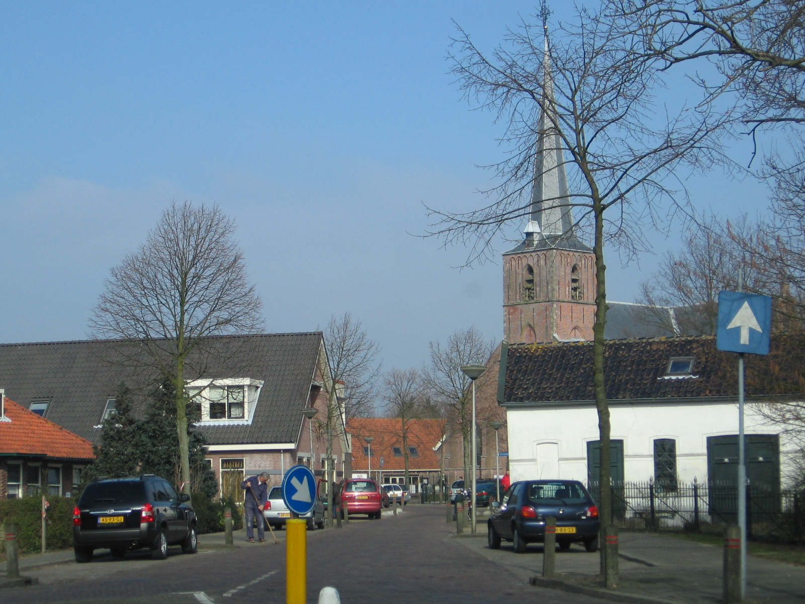 Zoeterwoude and surroundings